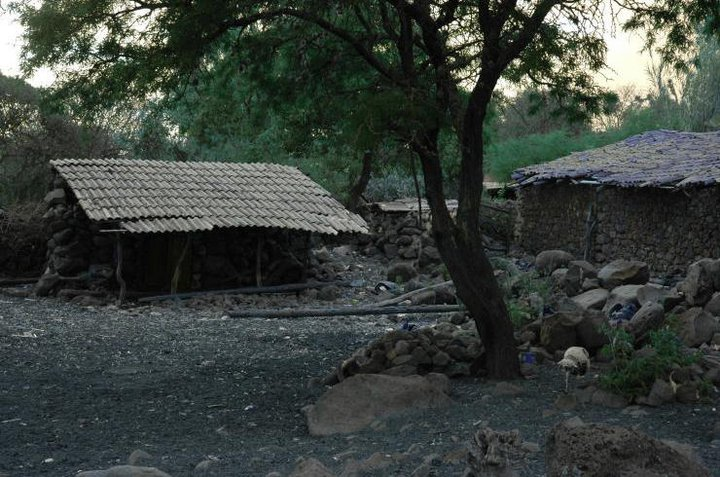 Paisaje rural en Uriangato